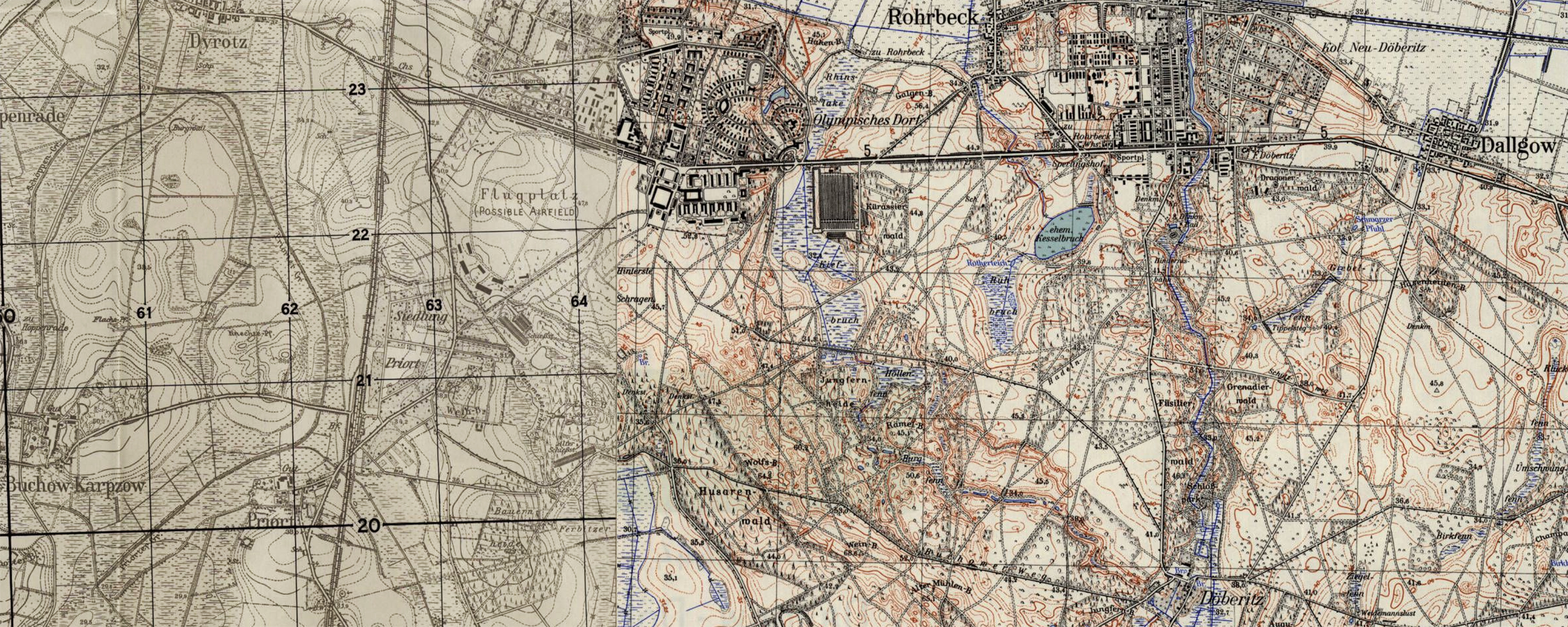 Lage des Flugplatzes Döberitz in den Messtischblättern 3443 u. 3444 der Preußischen Landesaufnahme 1:25000 in der Fortschreibung des Reichsamtes für Landesaufnahme 1936 und der Hauptvermessungsabteilung IV 1939. Diese OSM-Karte zeigt den gleichen Kartenausschnitt.